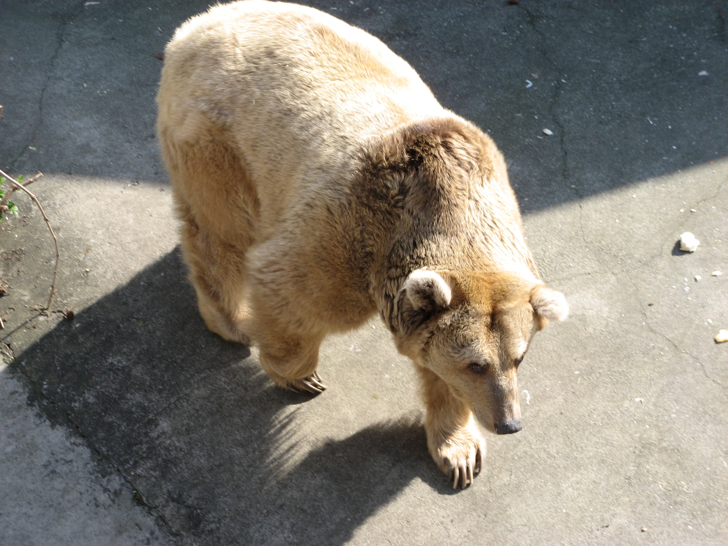 Oso Brown bear